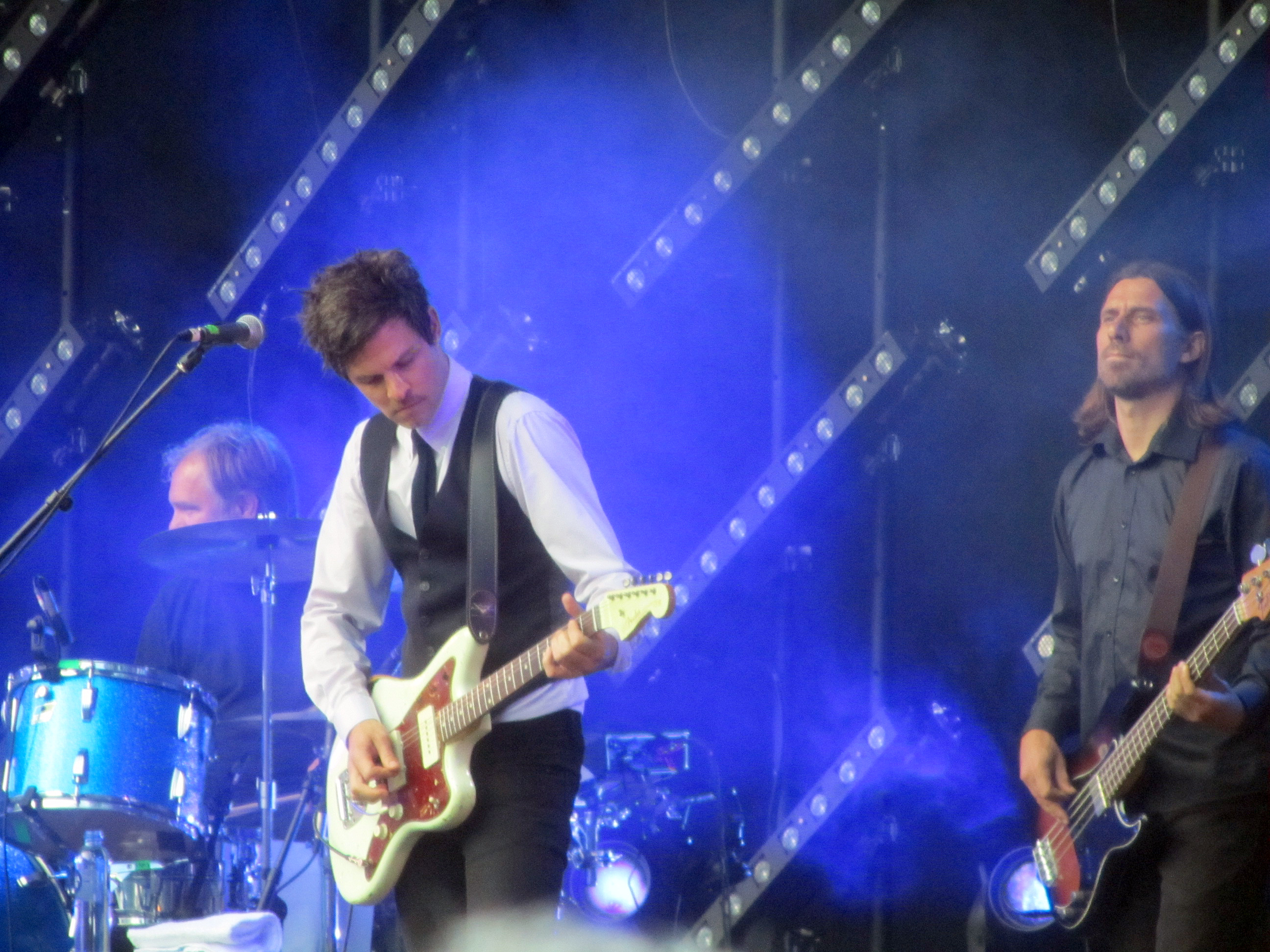 Kasper Rasmussen, guitar og Jeppe Langebek Knudsen – bas fra Sabyia i Tivoli Friheden, Aarhus